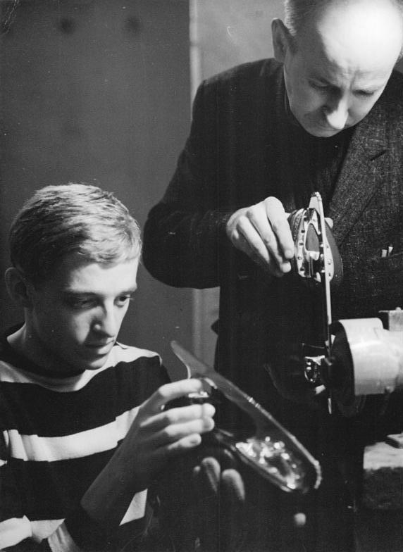 Bodo Bockenauer Zentralbild Sturm 20.1.1961 In wenigen Tagen beginnen die Europameisterschaften im Eiskunstlauf. Der 20-jährige deutsche Meister Bodo Bockenauer verwendet jede Freizeitsunde für seinen geliebten Eislaufsport. Besonders in den letzten Tagen vor den Europameisterschaften im Eiskunstlaufen vom 26. bis 29.1.1961 in Westberlin, trainiert er mit viel Fleiß und Energie auf dem Eisparkett der Werner-Seelenbinder-Halle. UBz: Ein guter Schliff der Schlittschuhe ist die Voraussetzung für einen sicheren Lauf.